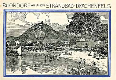 Notgeld